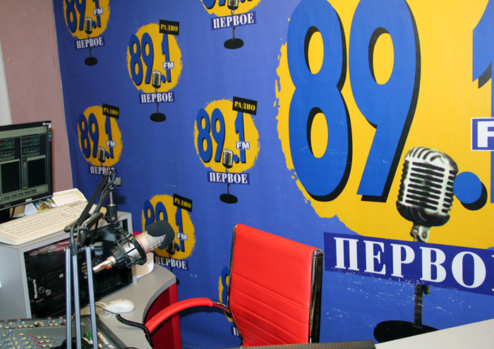 Фотография сделана в студии радиостанции